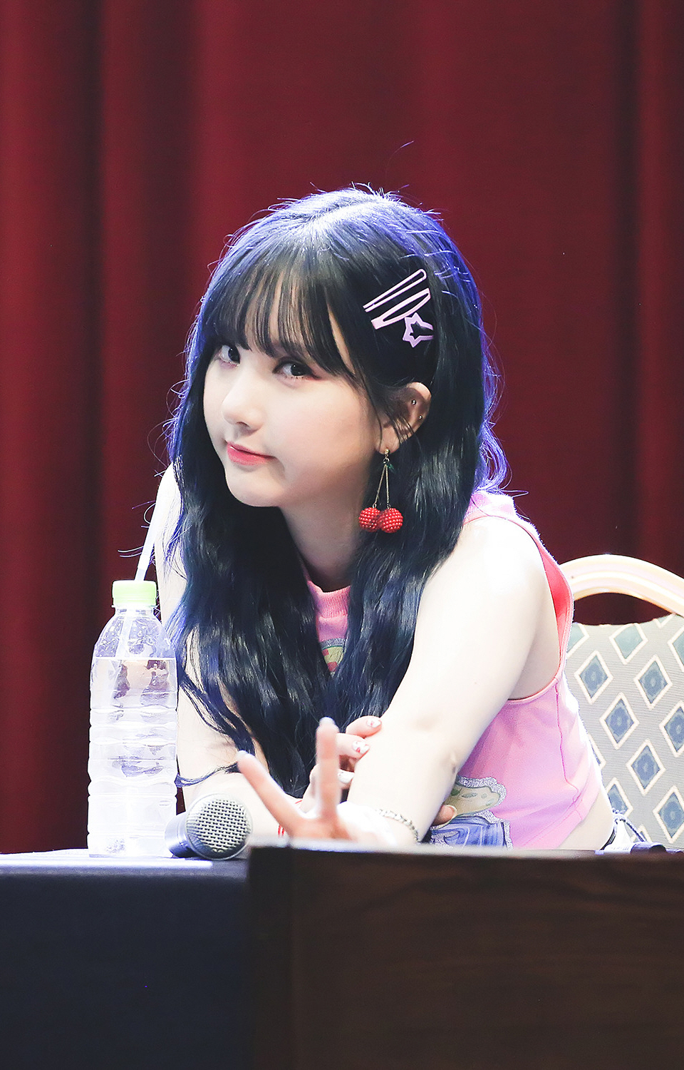 180721 노량진 팬싸인회